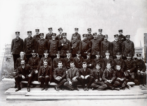 Monterzy firmy Ericsson